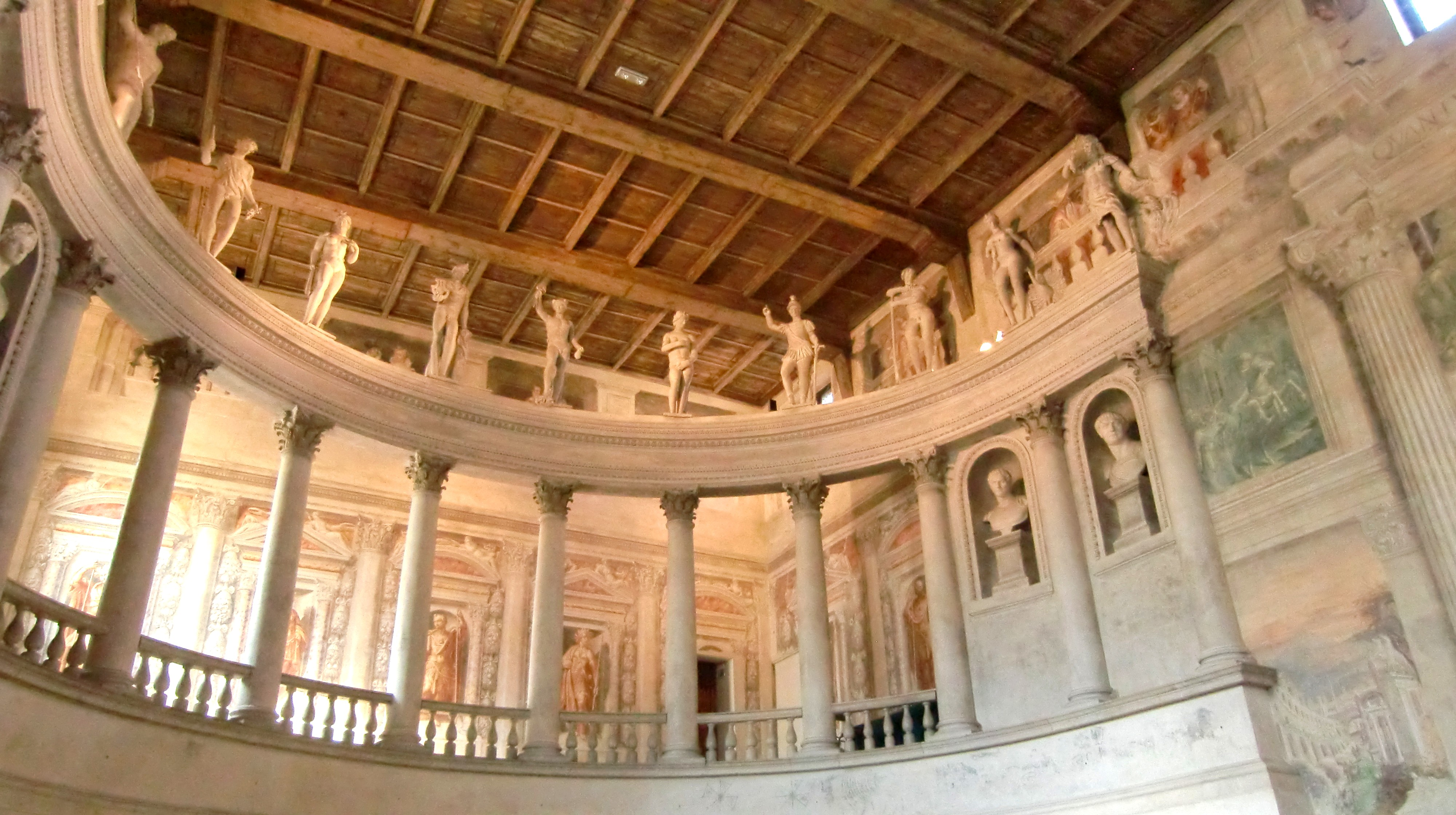 Sabbioneta, Teatro all'Antica progetto di Vincenzo Scamozzi 1588